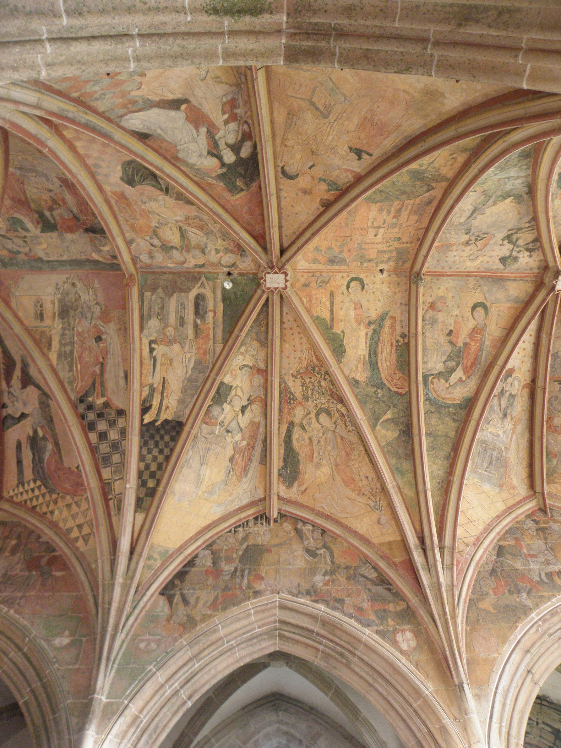 Voûtes de la2de travée du chœur de la chapelle Notre-Dame de Kernascléden (56) vues du collatéral sud. .